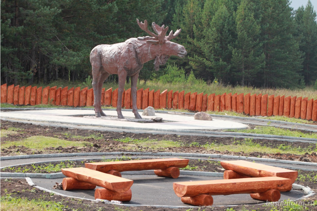 При въезде в Белорецк со стороны Уфы справа стоит гигантский чугунный лось. Он встречает многочисленных туристов со всей России, приезжающих сюда летом — на сплав, зимой — покататься на лыжах.